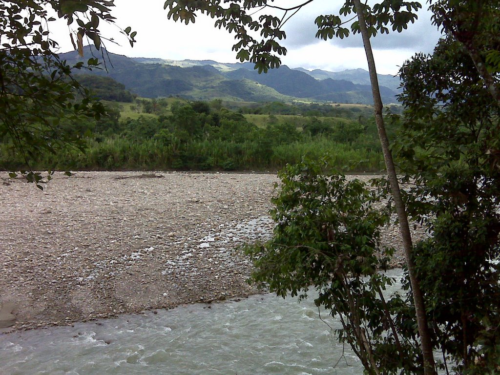 rio Tùa en el trayecto del Mirador